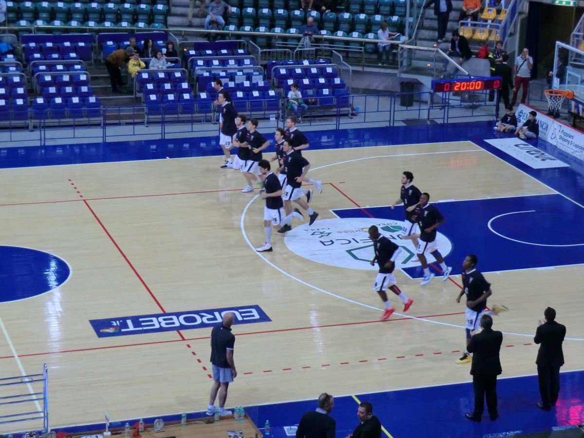 Alcune immagini scattate in occasione dell'incontro di LegaDue tra Bologna e Forlì al PalaDozza di Bologna.